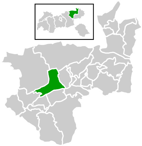 Lage der Gemeinde innerhalb des Bezirks Kufstein